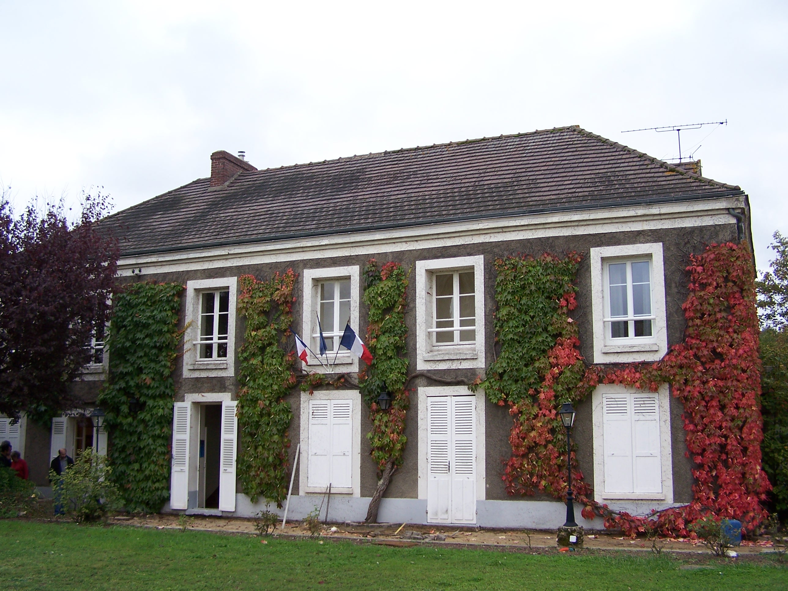 Mairie de Bazoches-sur-Guyonne (Yvelines, France)